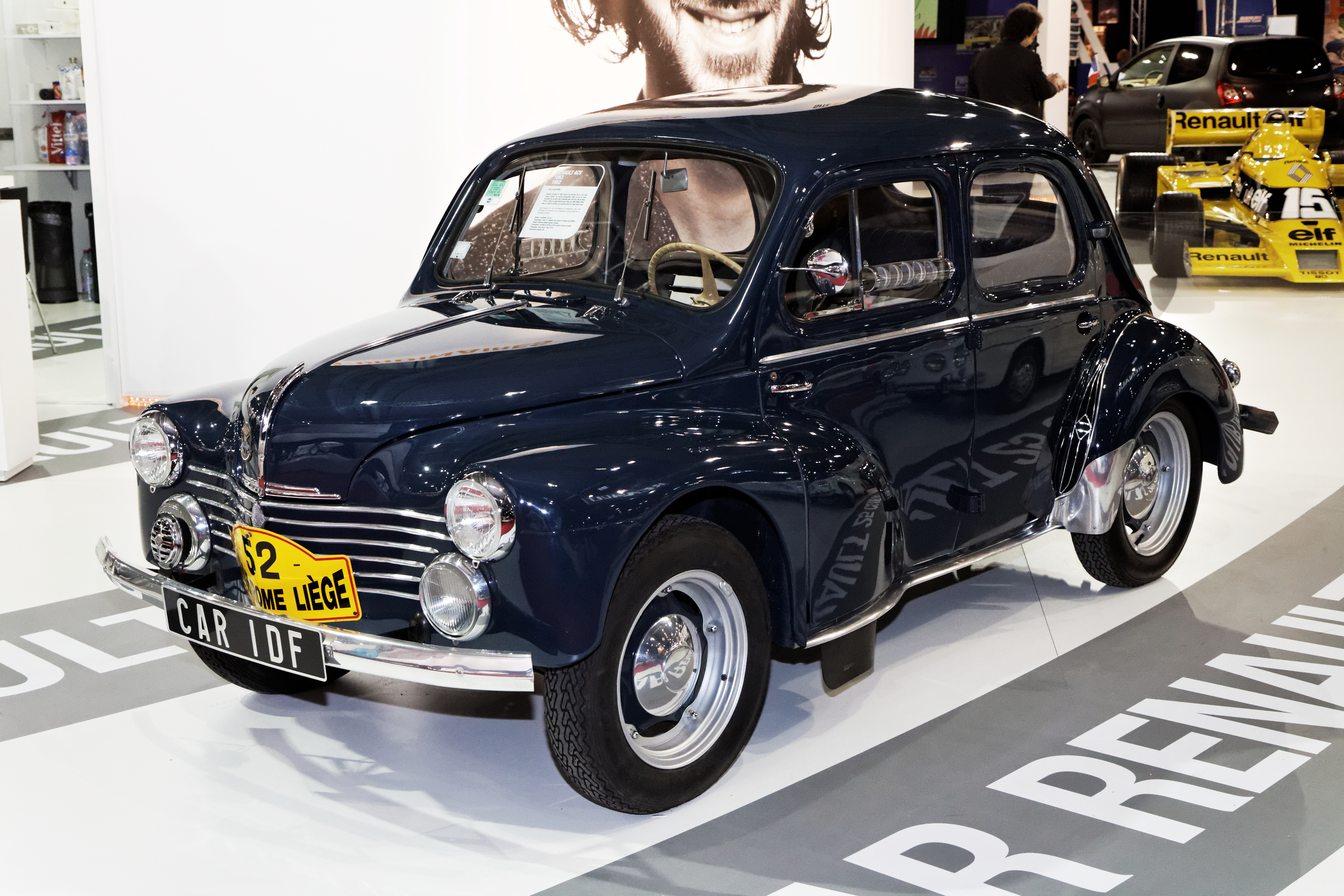 Une Renault 4CV présentée lors du salon Retromobile 2013.